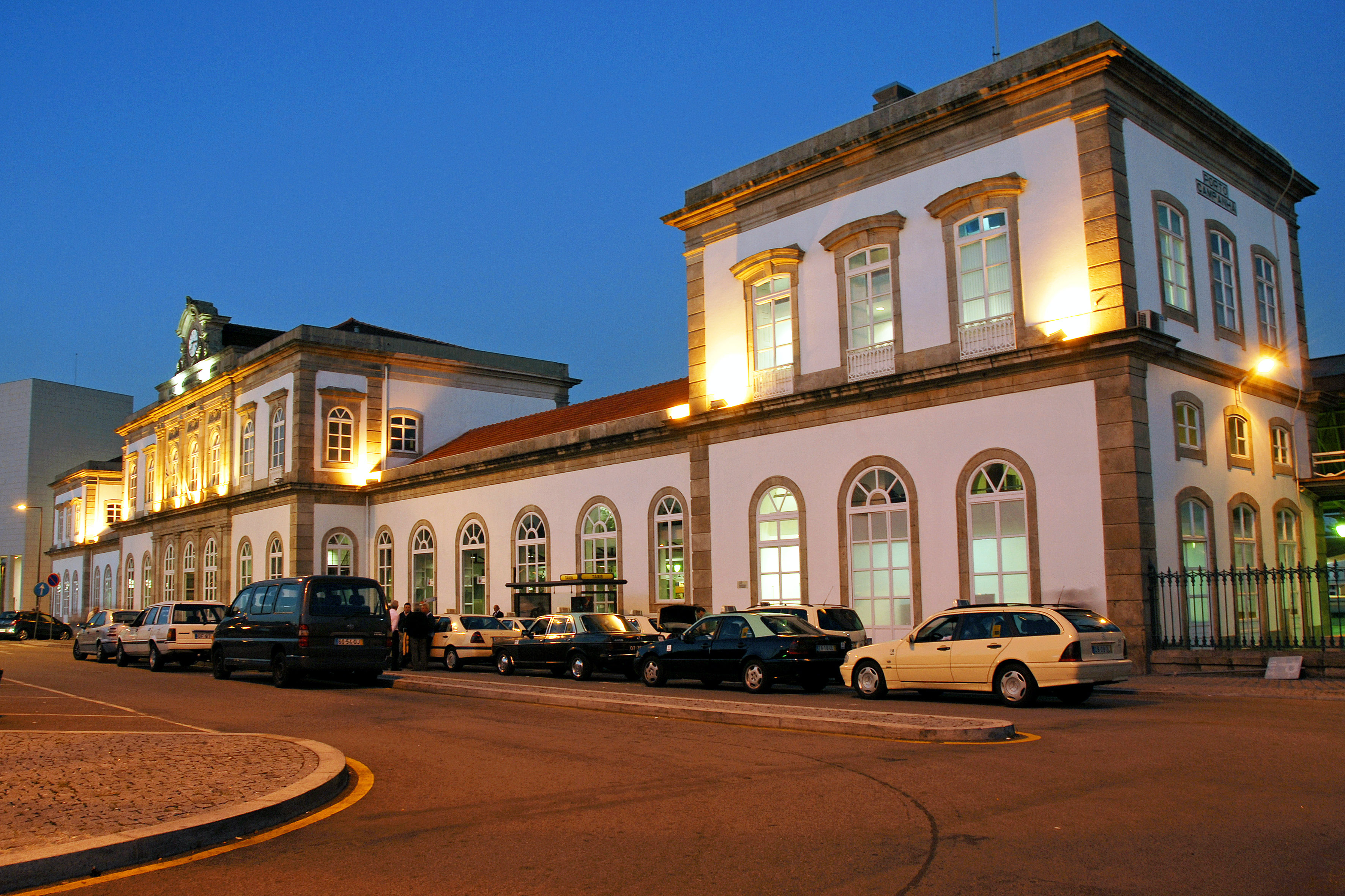 Campanhã-Estação Ferroviária de Campanhã This file was uploaded for Wiki Loves Monuments in Portugal with the unique identifier 97023030.